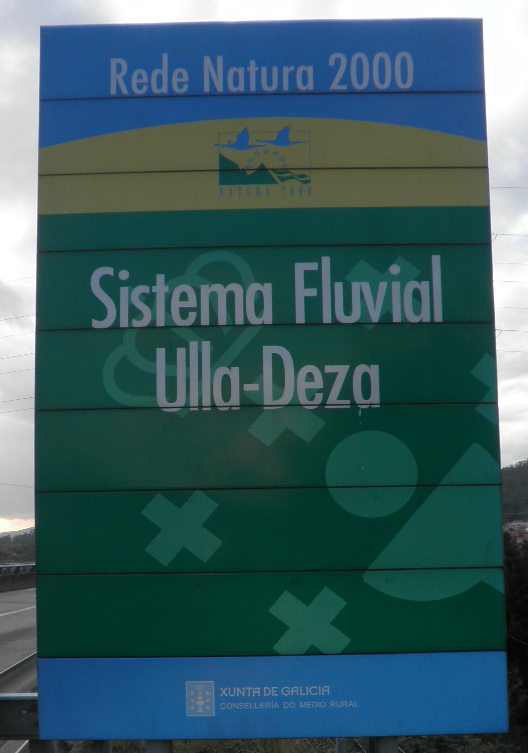 Letreiro indicador do Sistema fluvial Ulla-Deza da Rede Natura 2000